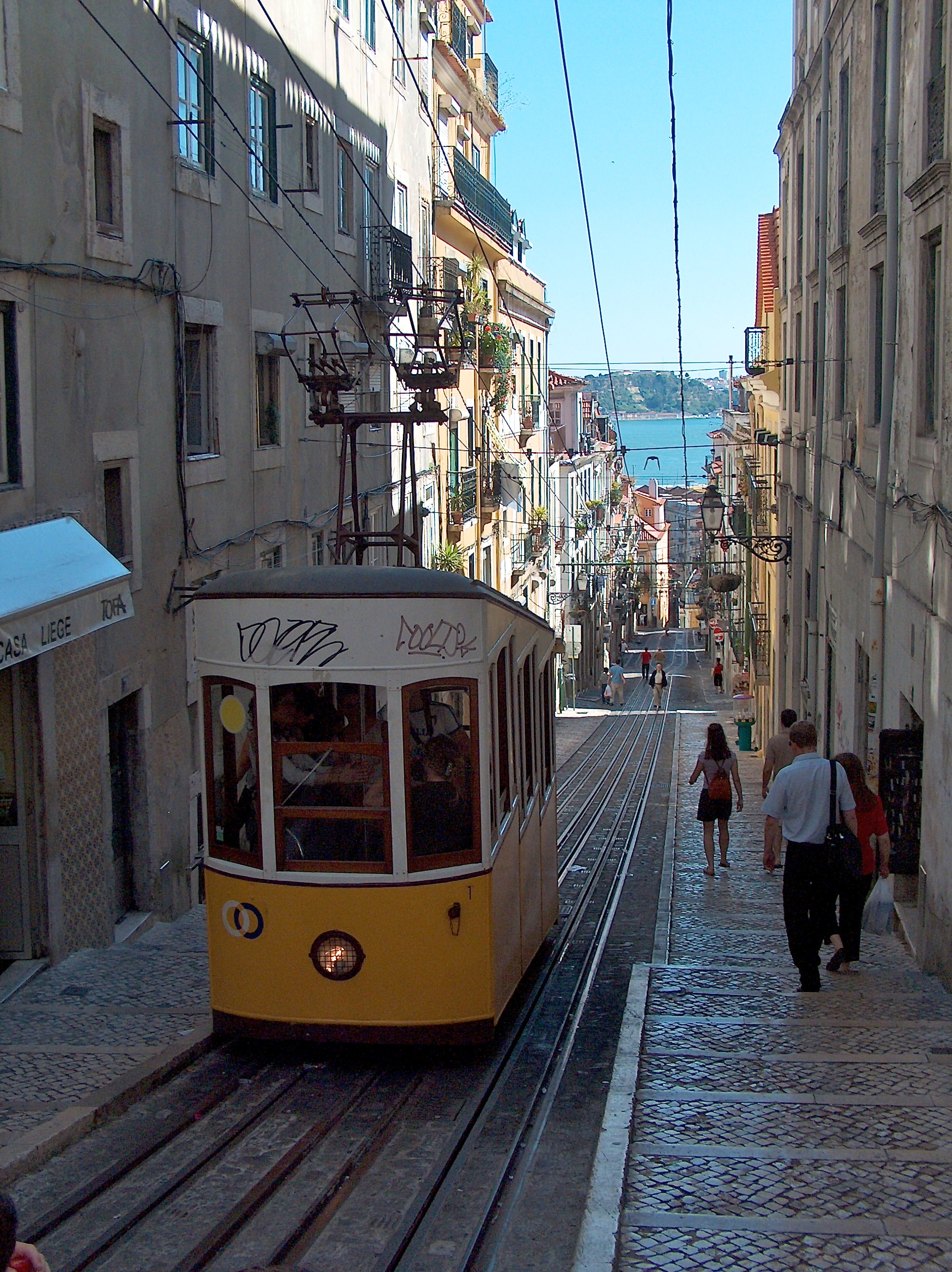 Elevador da Bica. Situado no Bairro da Bica em Lisboa, Portugal.